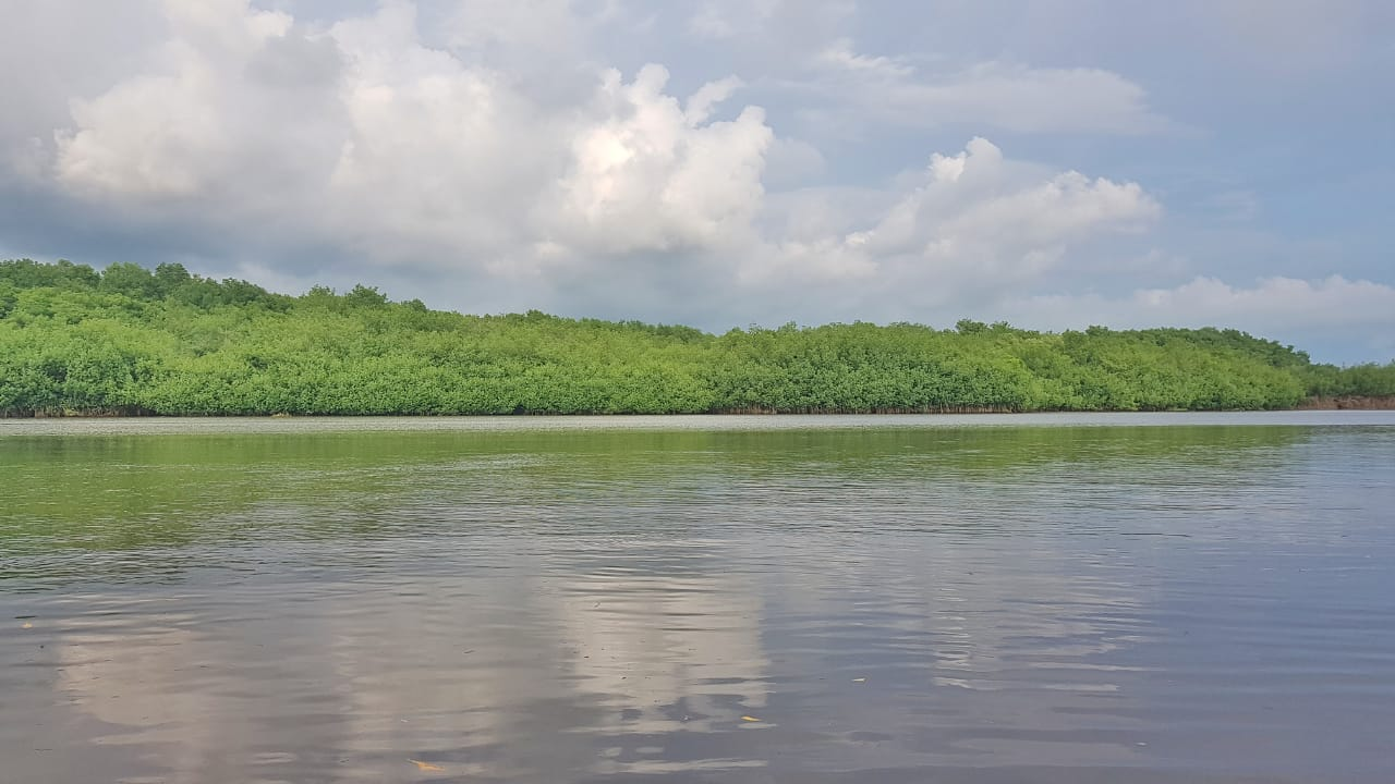 Vista del manglar de la Barra de Santiago